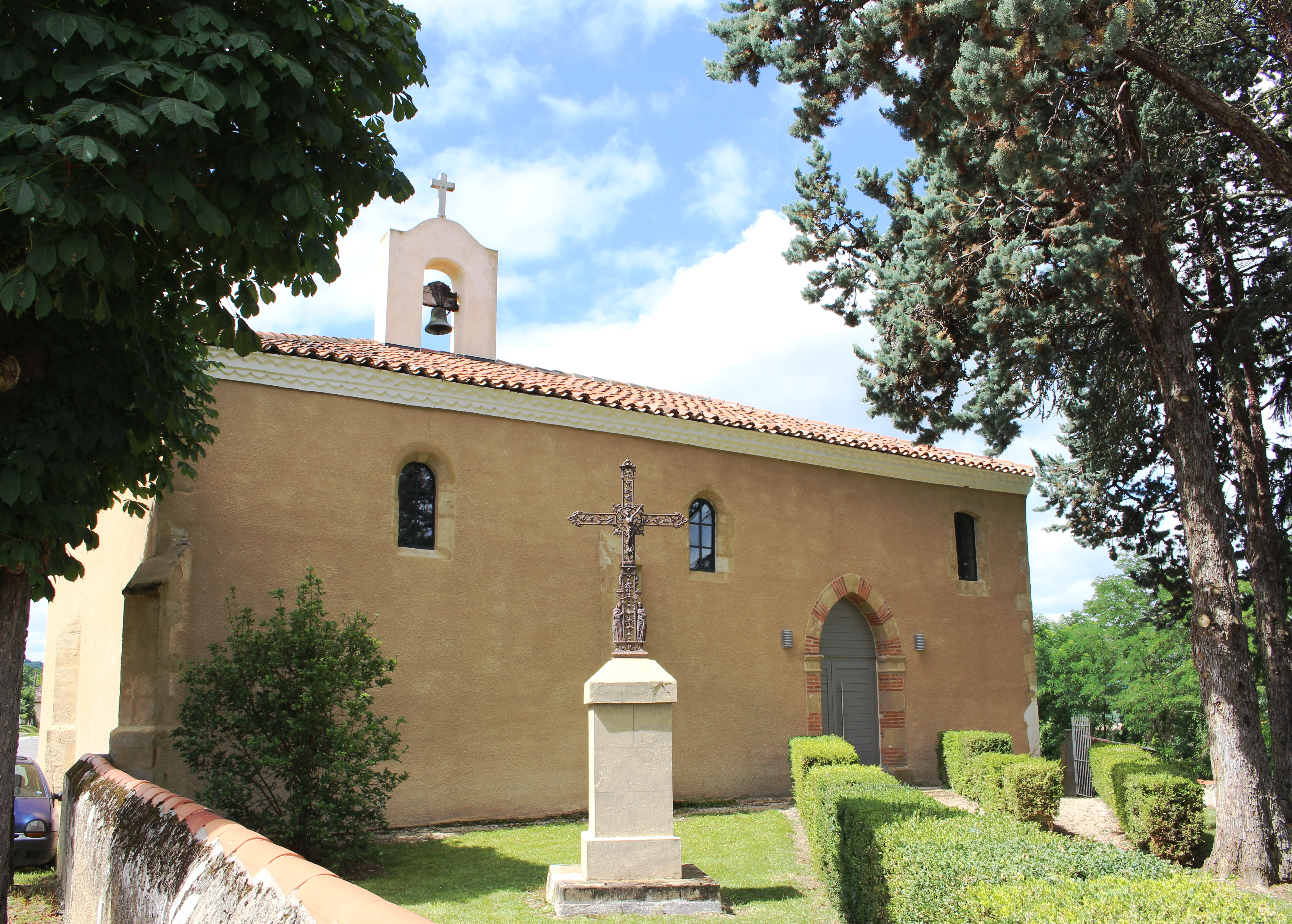 Chapelle des Pénitents de Monléon-Magnoac (Hautes-Pyrénées)